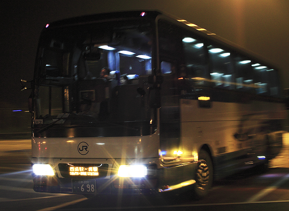 中国JRバス 呉エクスプレス大阪号 いすゞ・ガーラII 641-4909